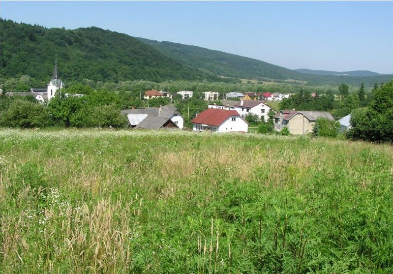 Celkový pohľad